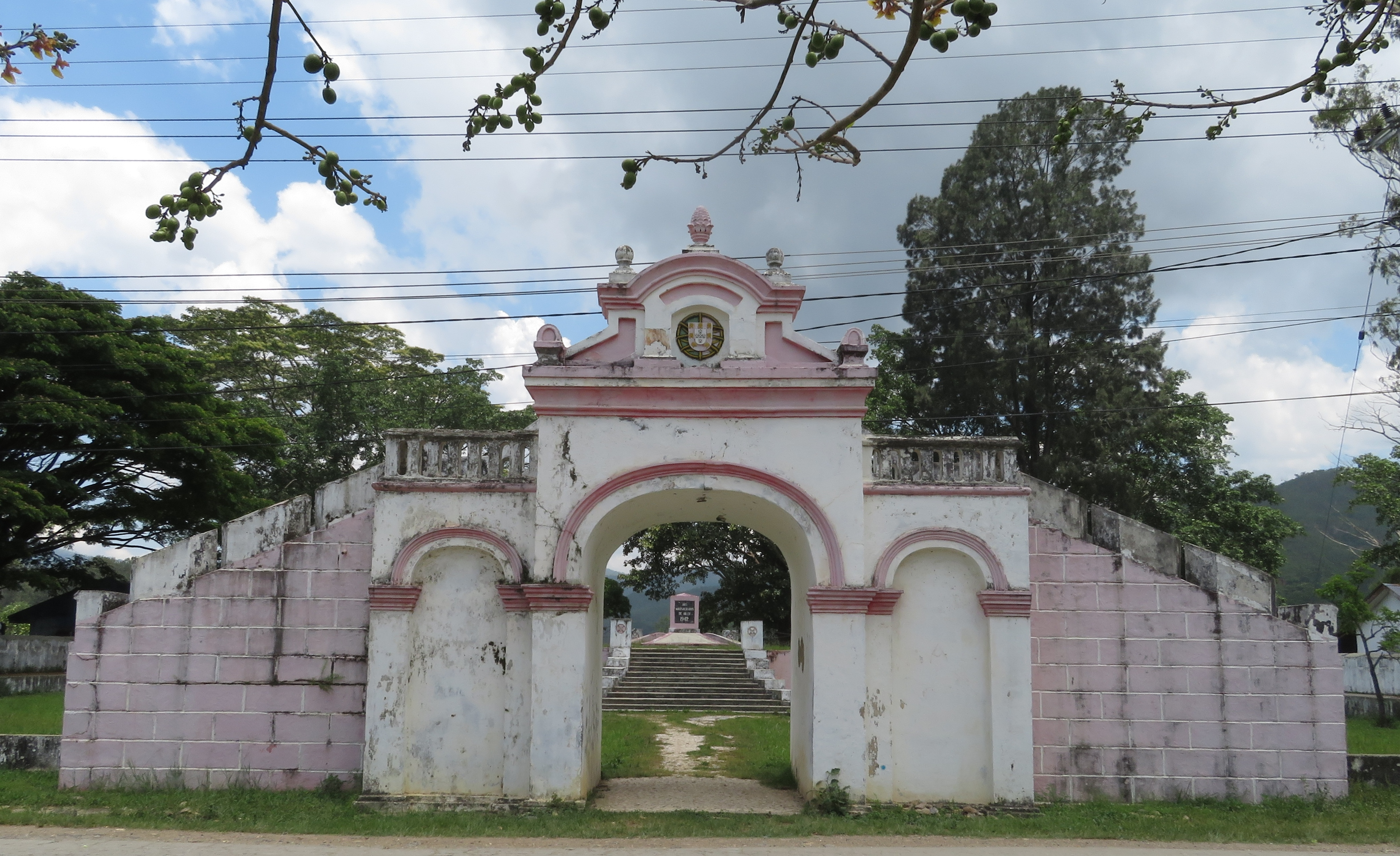 Denkmal zur Erinnerung an das Massaker von 1942, Aileu, Timor Leste